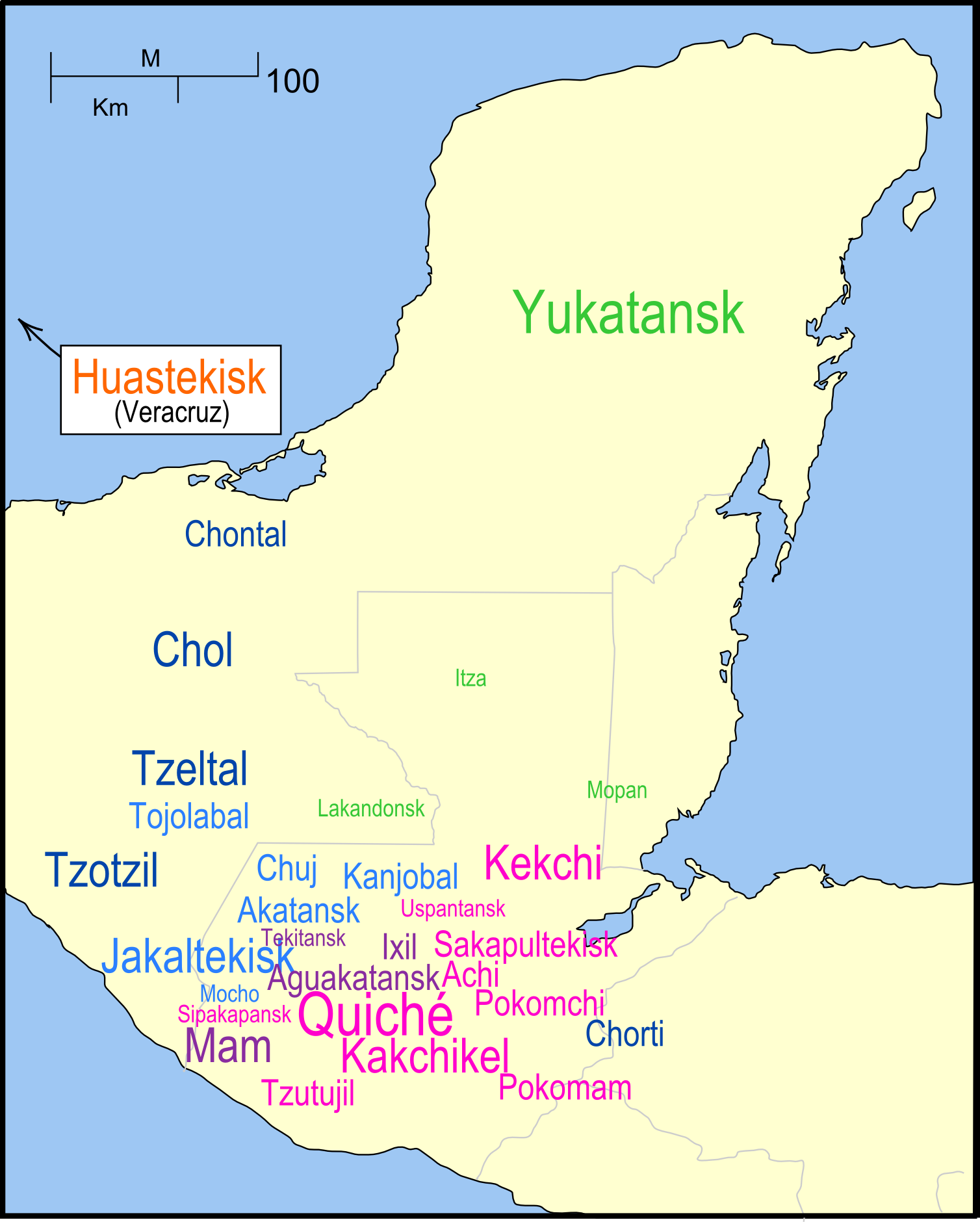 Kart som viser dagens utbredelse av de mayiske språka. Språk som er skrevet i samme farge, tilhører samme undergruppe. Skriftstørrelsen viser det relative antallet språkbrukere. Størst skrift = over 500 000 brukere Stor skrift = over 100 000 brukere Middels skrift = over 10 000 brukere Liten skrift = under 10 000 brukere